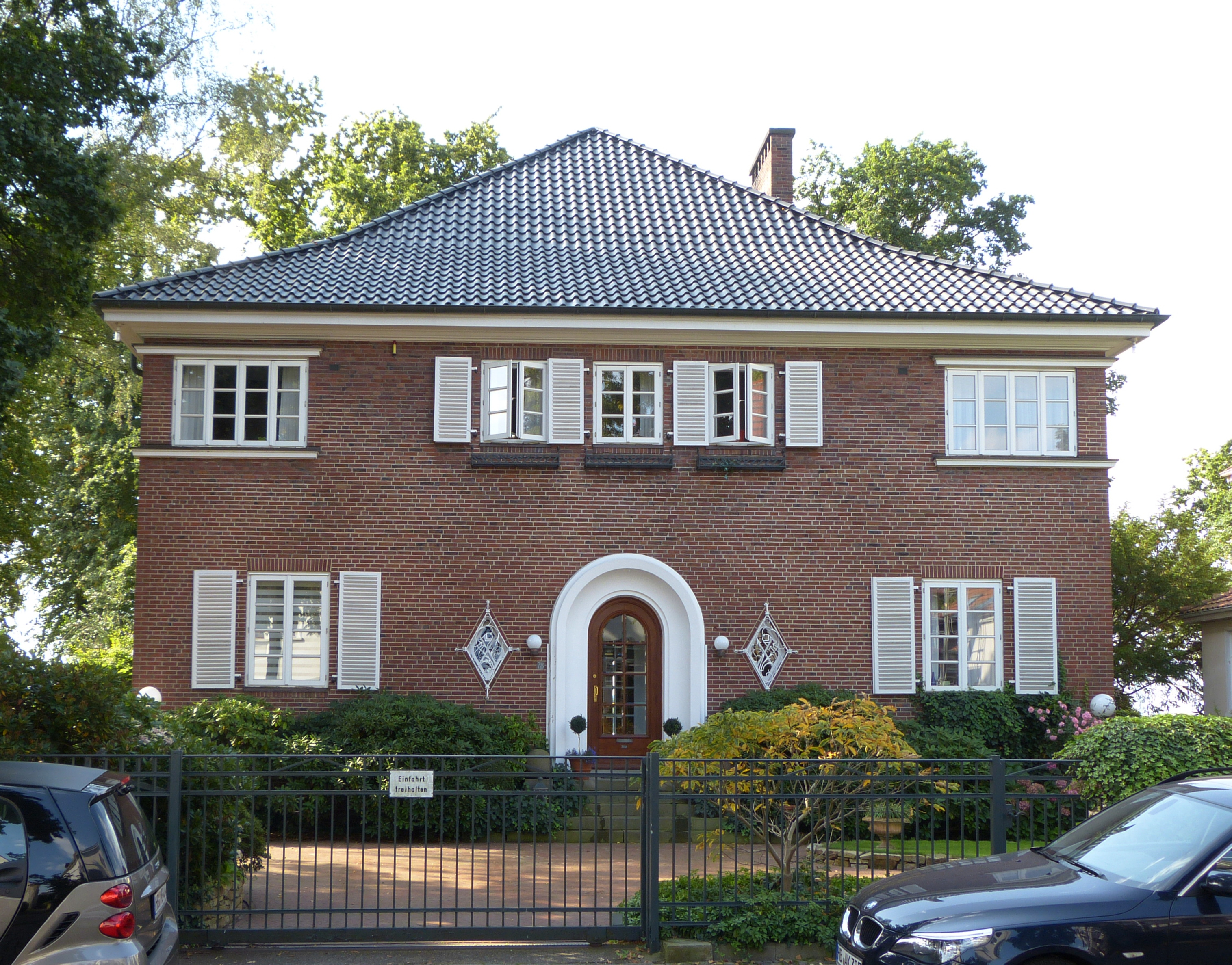 Haus Buermeyer in Bremen, Weserstraße 78Das abgebildete Objekt ist ein geschütztes Kulturdenkmal in der Freien Hansestadt Bremen, mit der Nr. 2183 beim Landesamt für Denkmalpflege registriert.